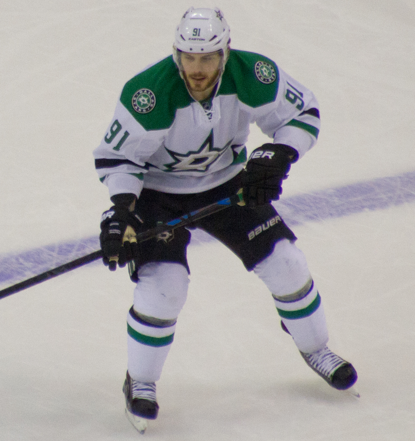 Capitals 1 / Dallas Stars 4